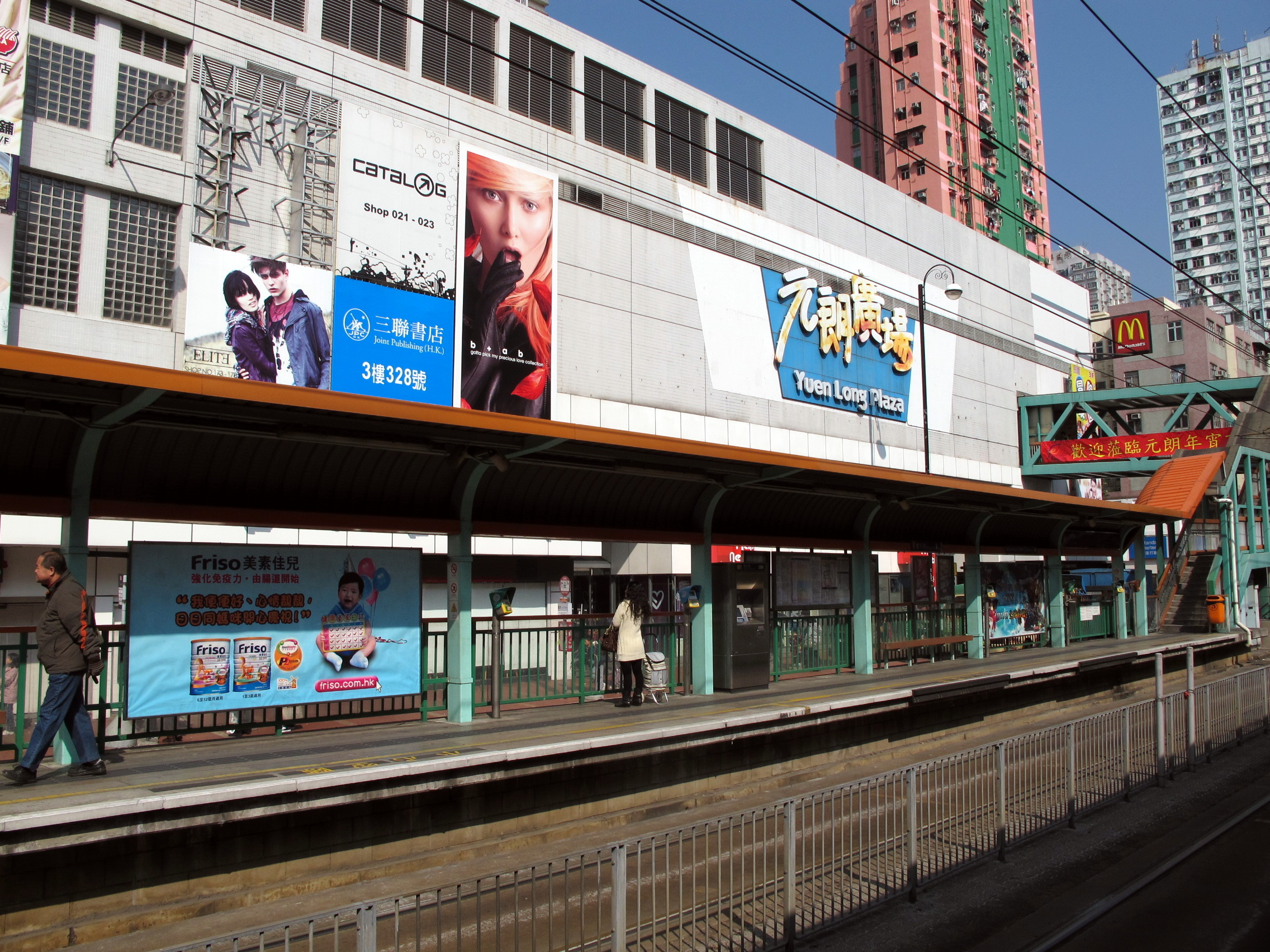 Yuen Long Plaza Exterior